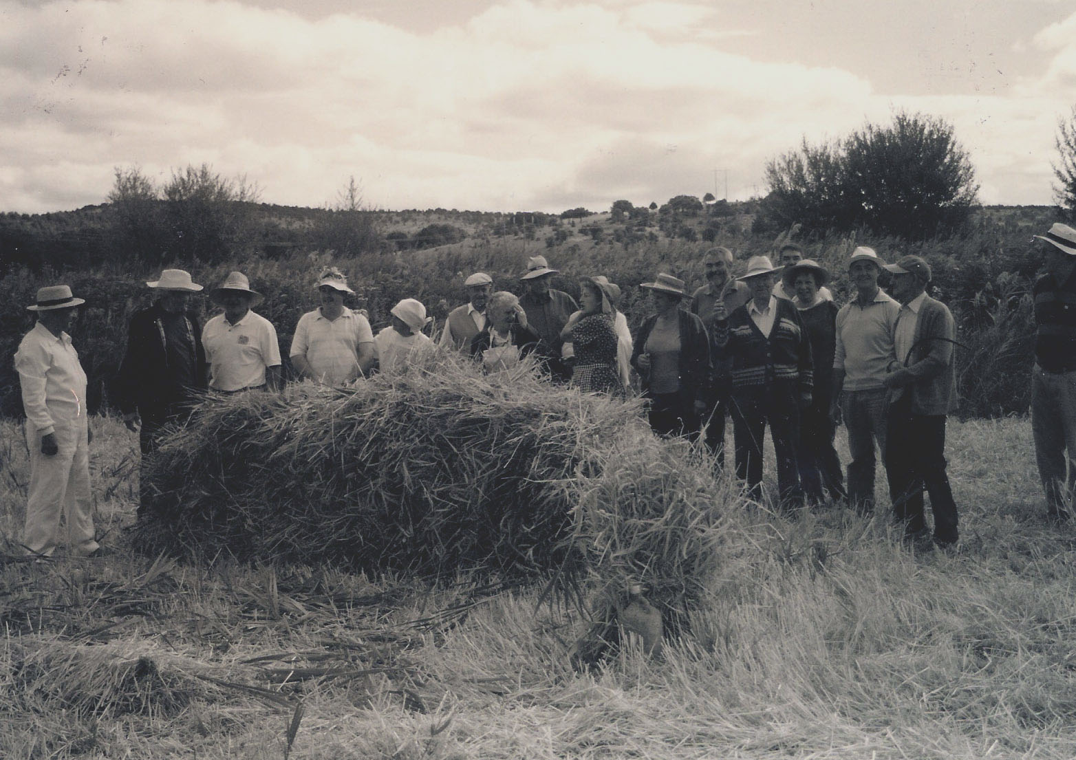 Costumbres